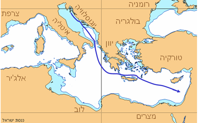 אוניית המעפילים כנסת ישראל - מסלול